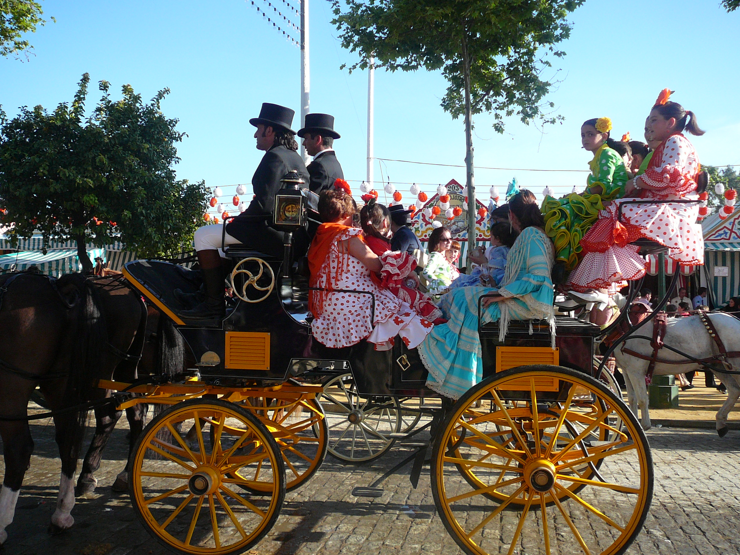 Carro de caballos con mujeres de flamenca en la Feria de Sevilla